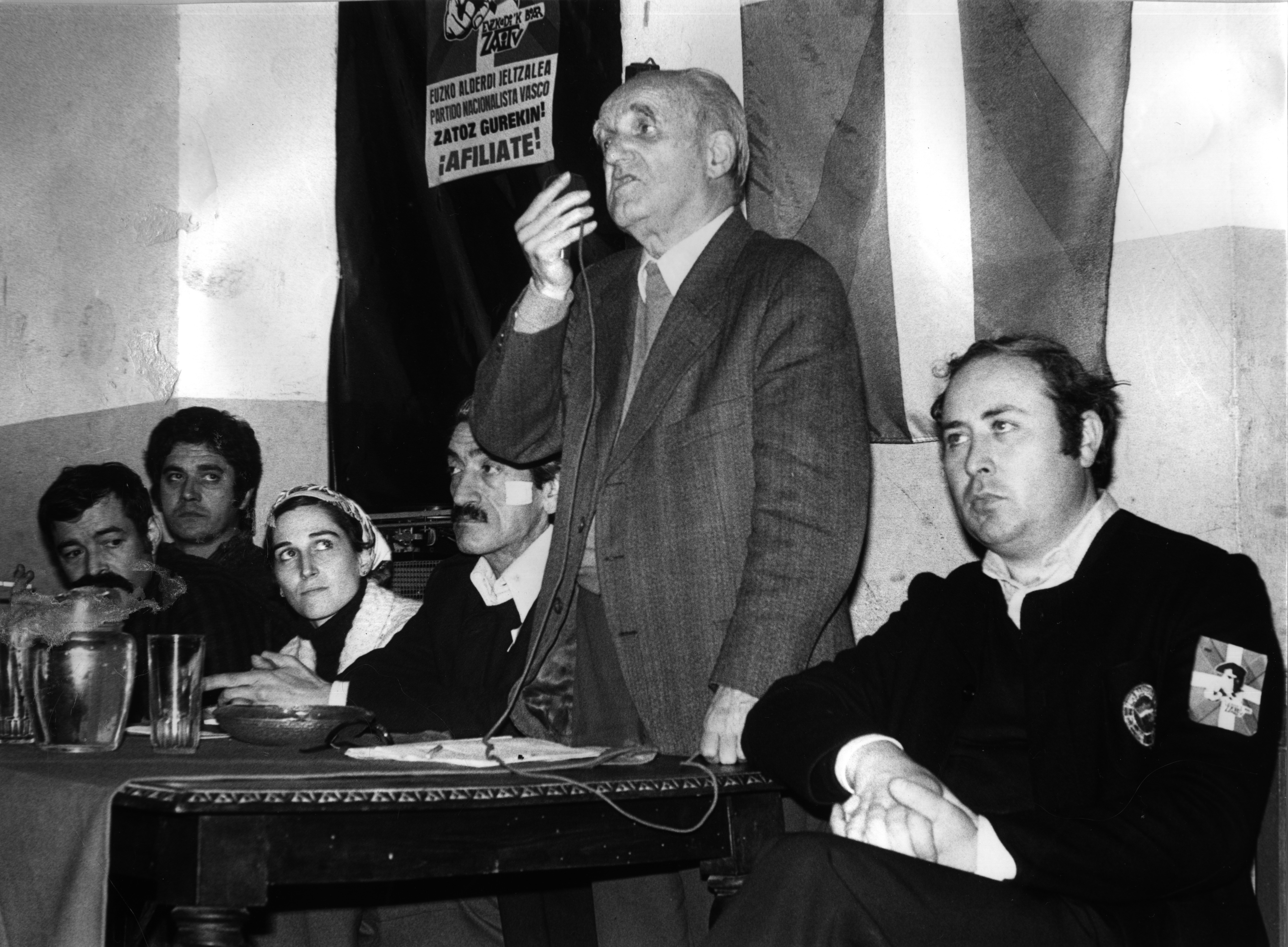 Juan Ajuriagerra mitina ematen Karrantzan.